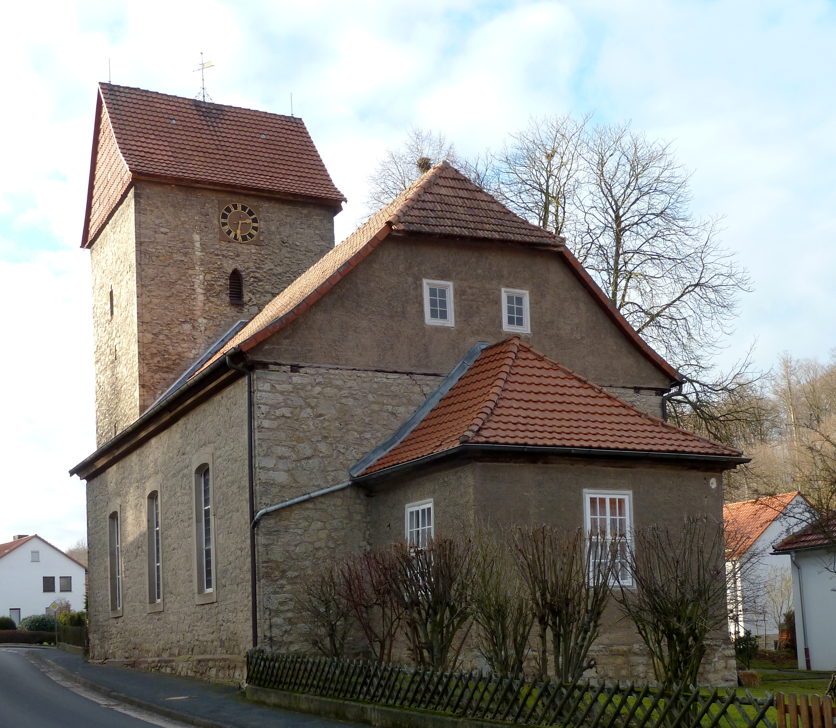 Ev.-luth. Kirche in Settmarshausen, Gemeinde Rosdorf, Niedersachsen. Langhaus erbaut 1774 an vorhandenem mittelalterlichem Wehrturm